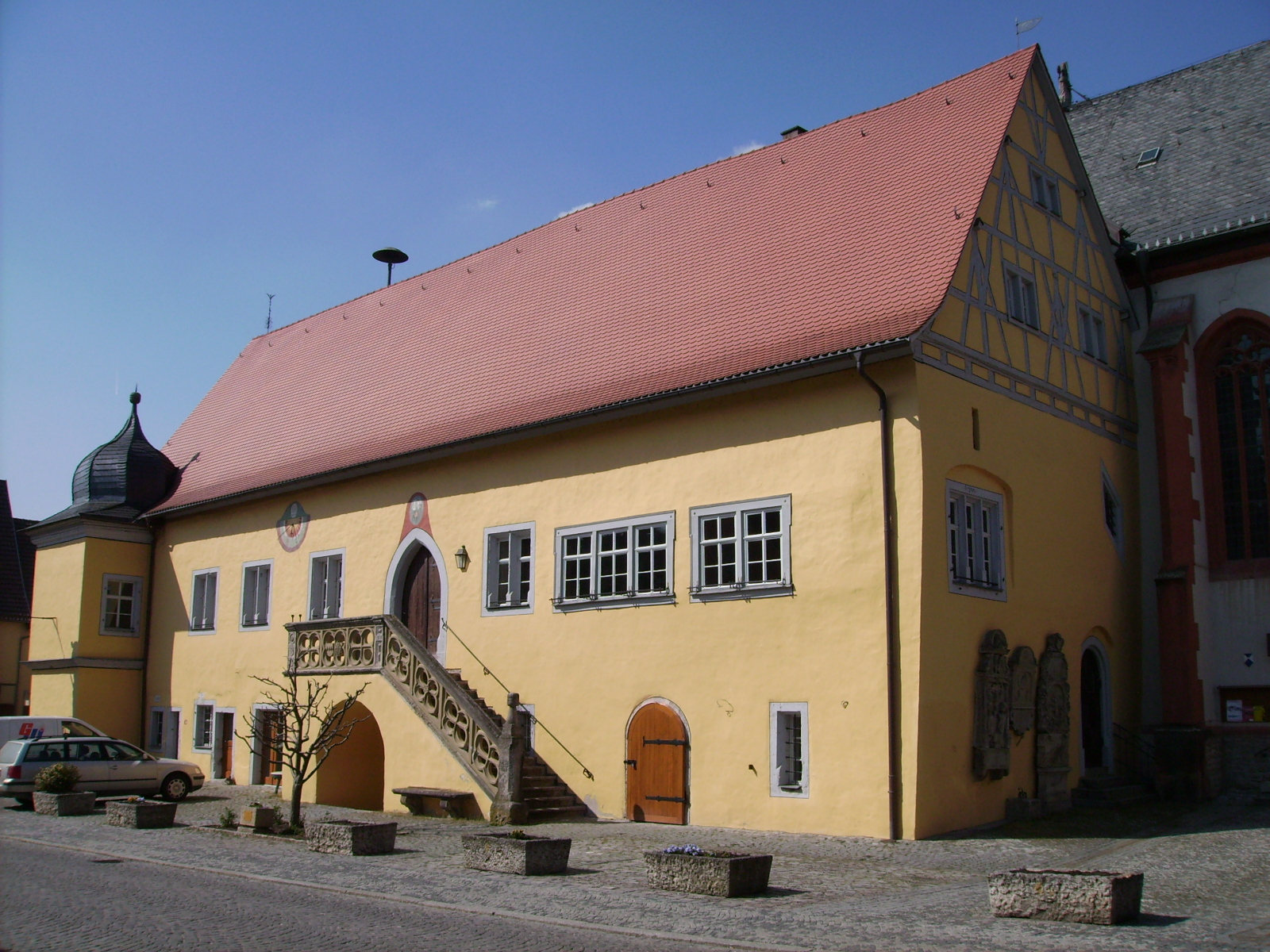 Frickenhausen am Main. Rathaus